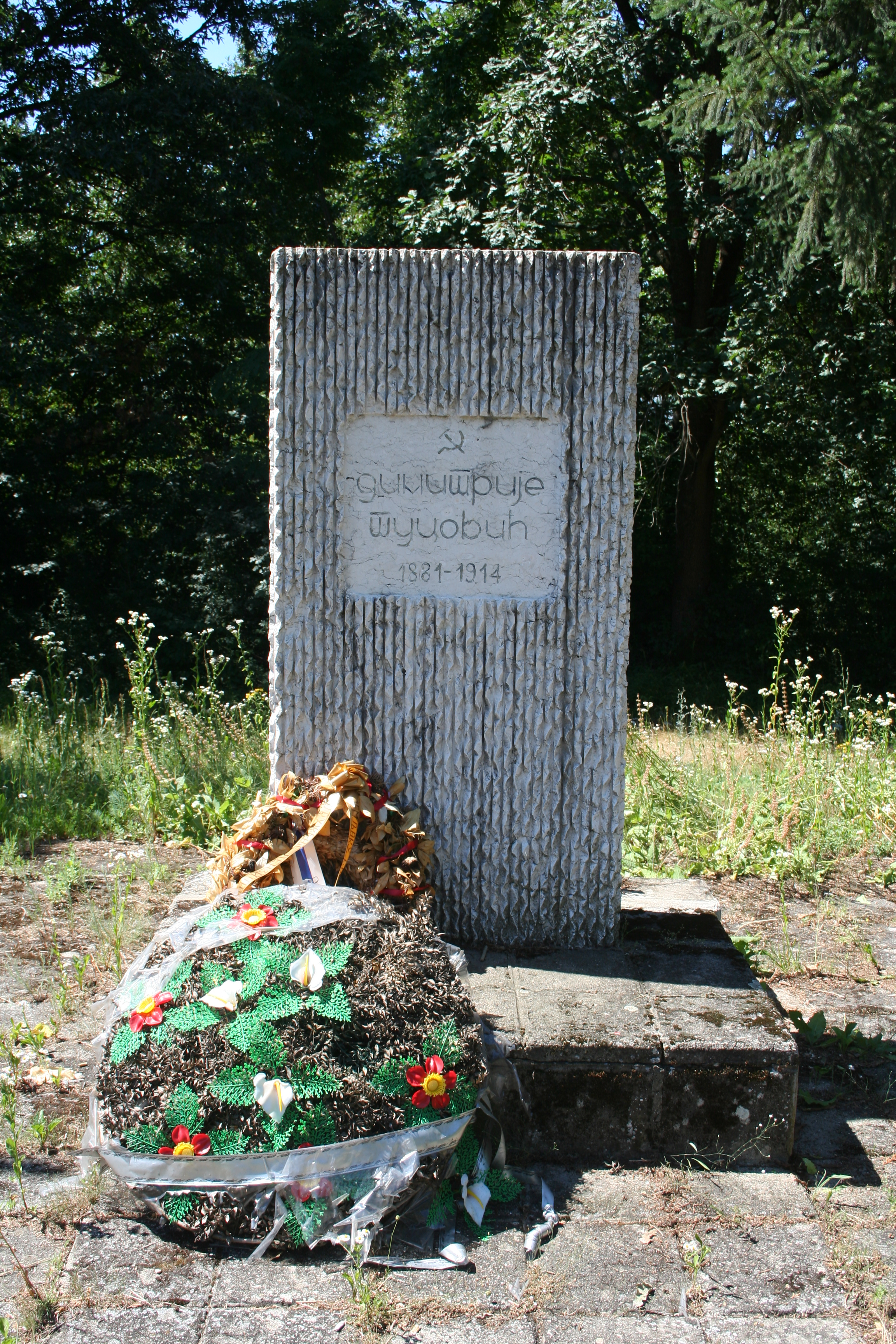 Vrače brdo, Lajkovac